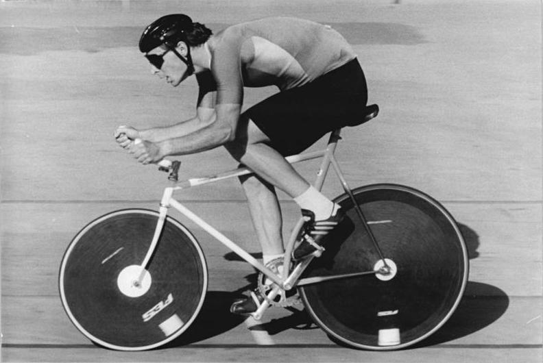 Steffen Blochwitz ADN-ZB Weisflog 22.6.89 Cottbus: DDR-Meisterschaften im Bahnradsport - Steffen Blochwitz (SC Cottbus) siegte im Finale des 4.000 m-Einzelverfogungsfahrens gegen Jens Lehmann (SC DFfK Leipzig) in 4:38,99 min.